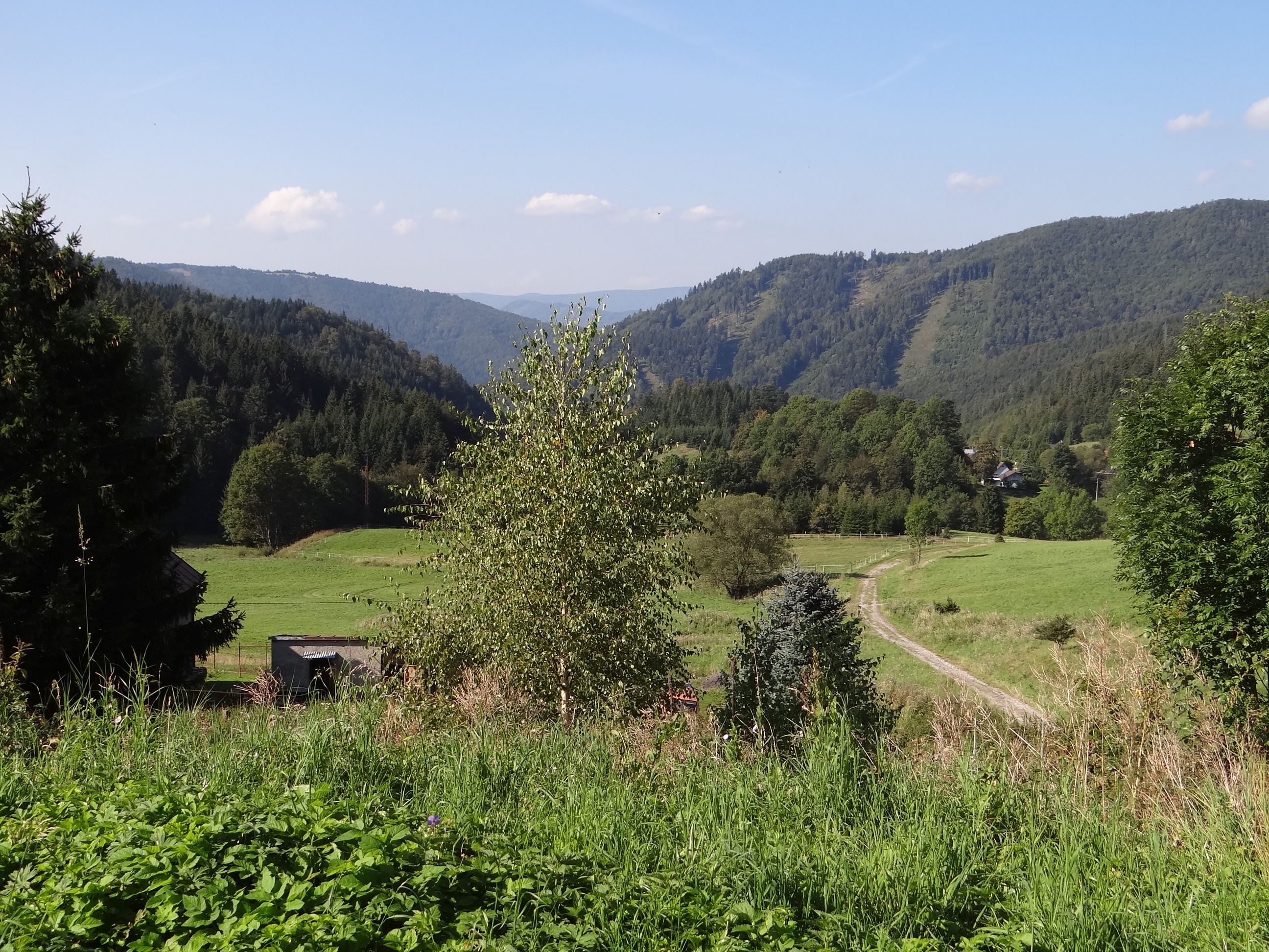 Donovaly